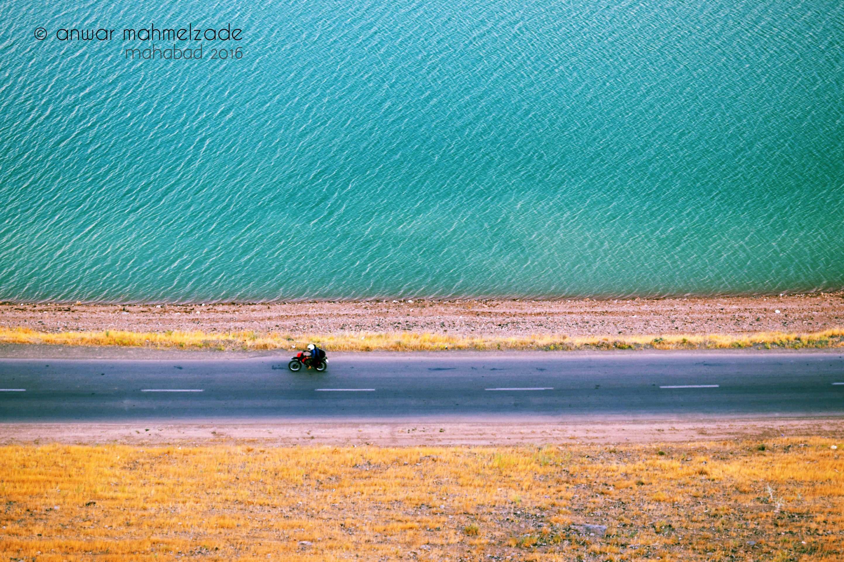 عکس از انور محمل زاده